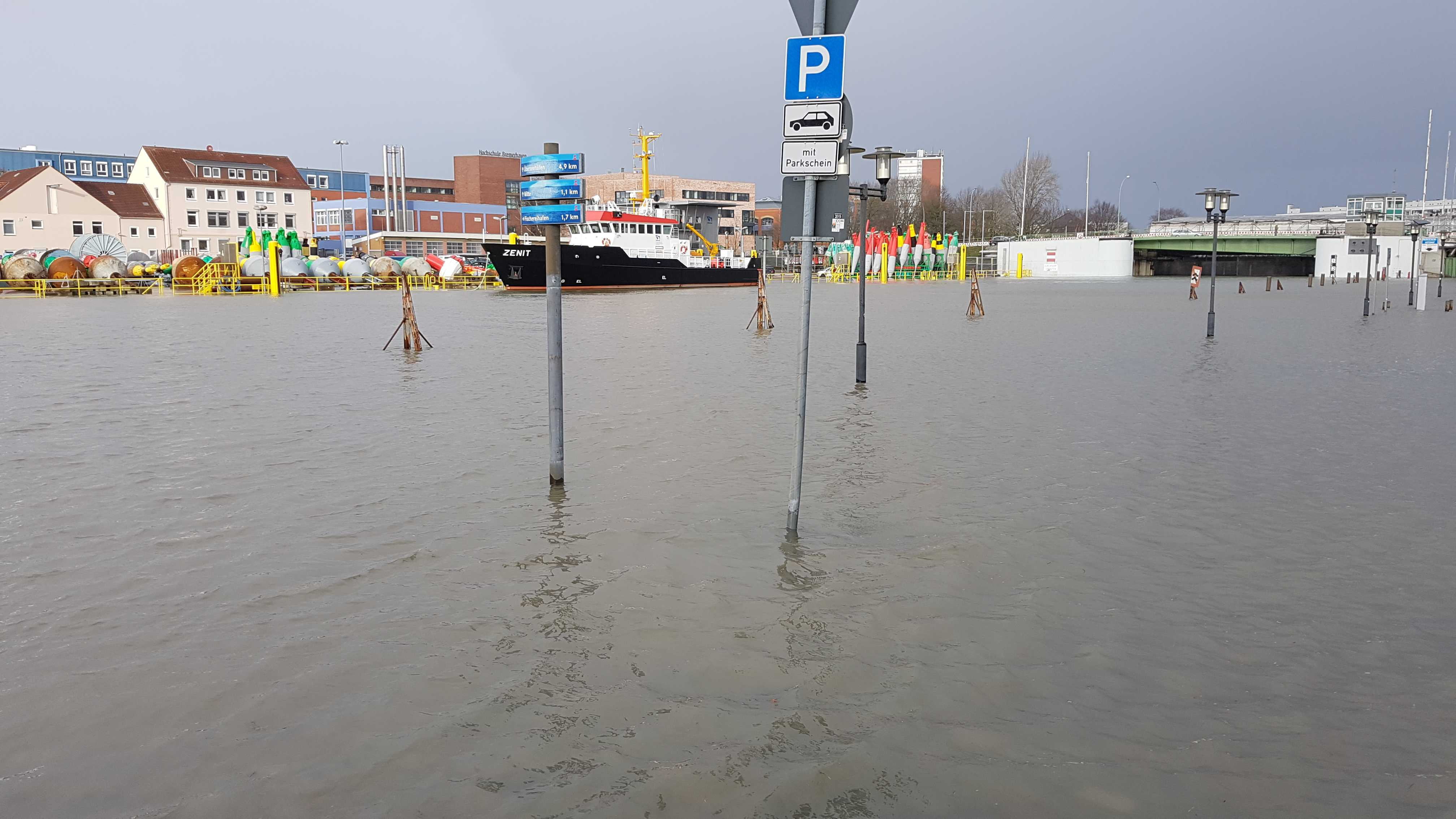 Sturmflut in der Geestemündung. Wegen Sanierungsarbeiten ist die Kennedybrücke noch eingehaust.